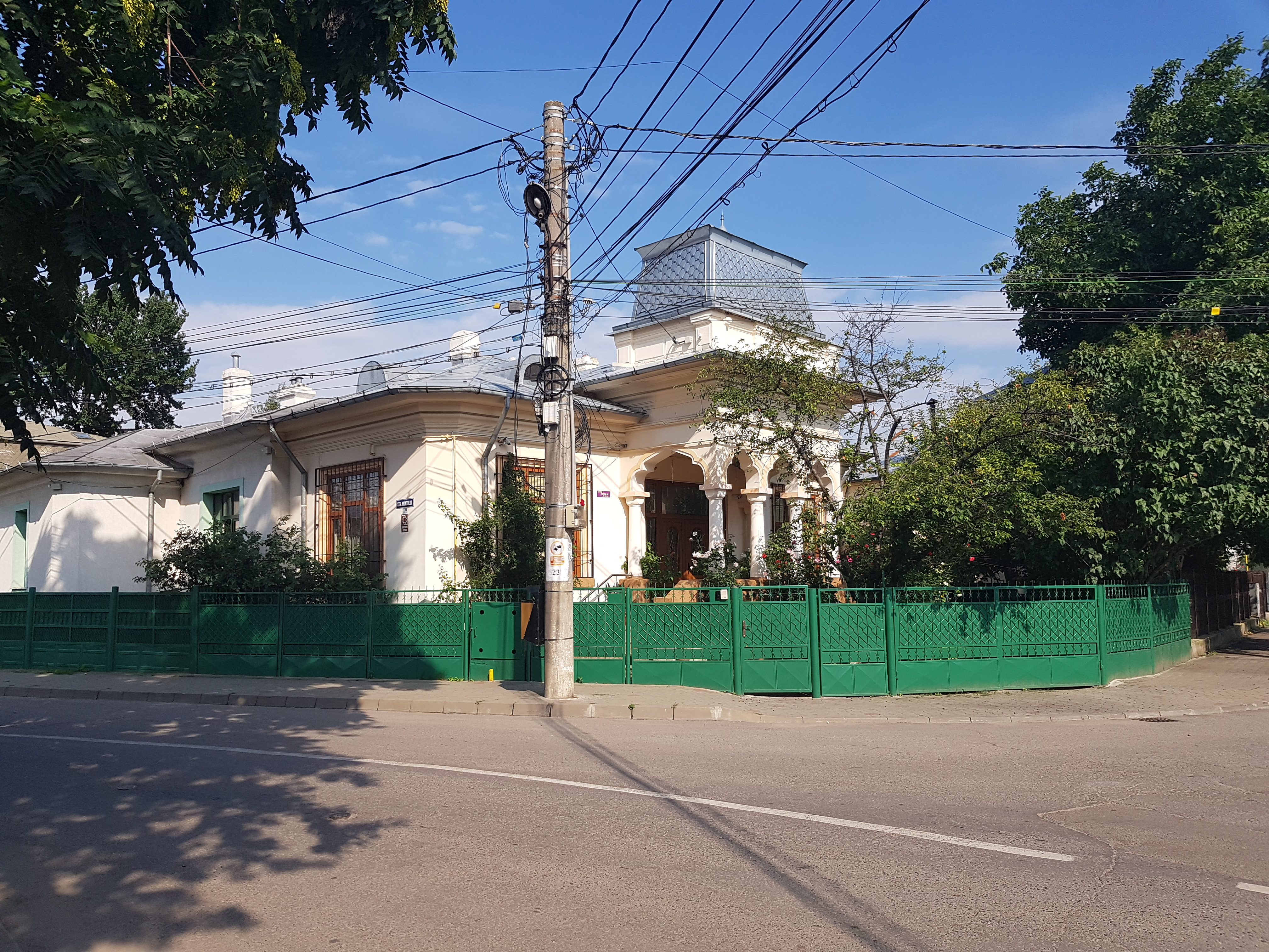 Casă, monument istoric din Focșani